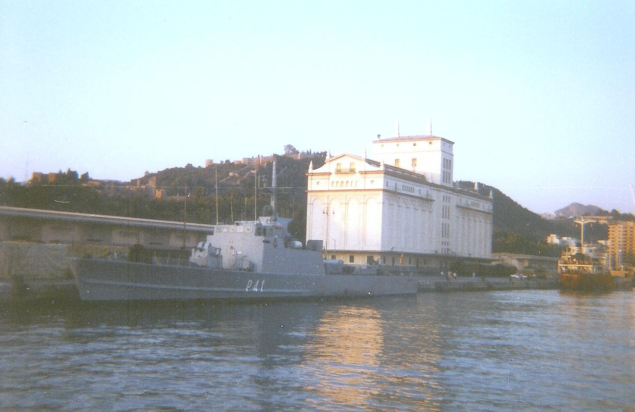 Patrullero Cormorán (P-41) de la armada española, actual Patrullero Espartana (PO-41), de la armada de la República de Colombia